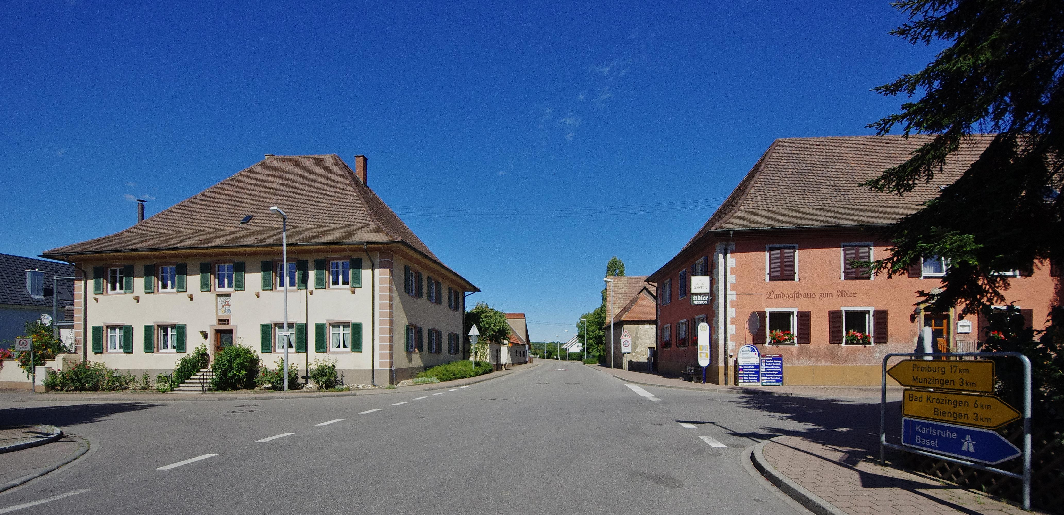 Technisches Rathaus Freiburg